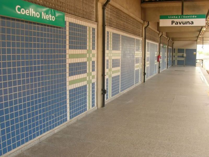 Foto da estação Coelho Neto do Metrô Rio